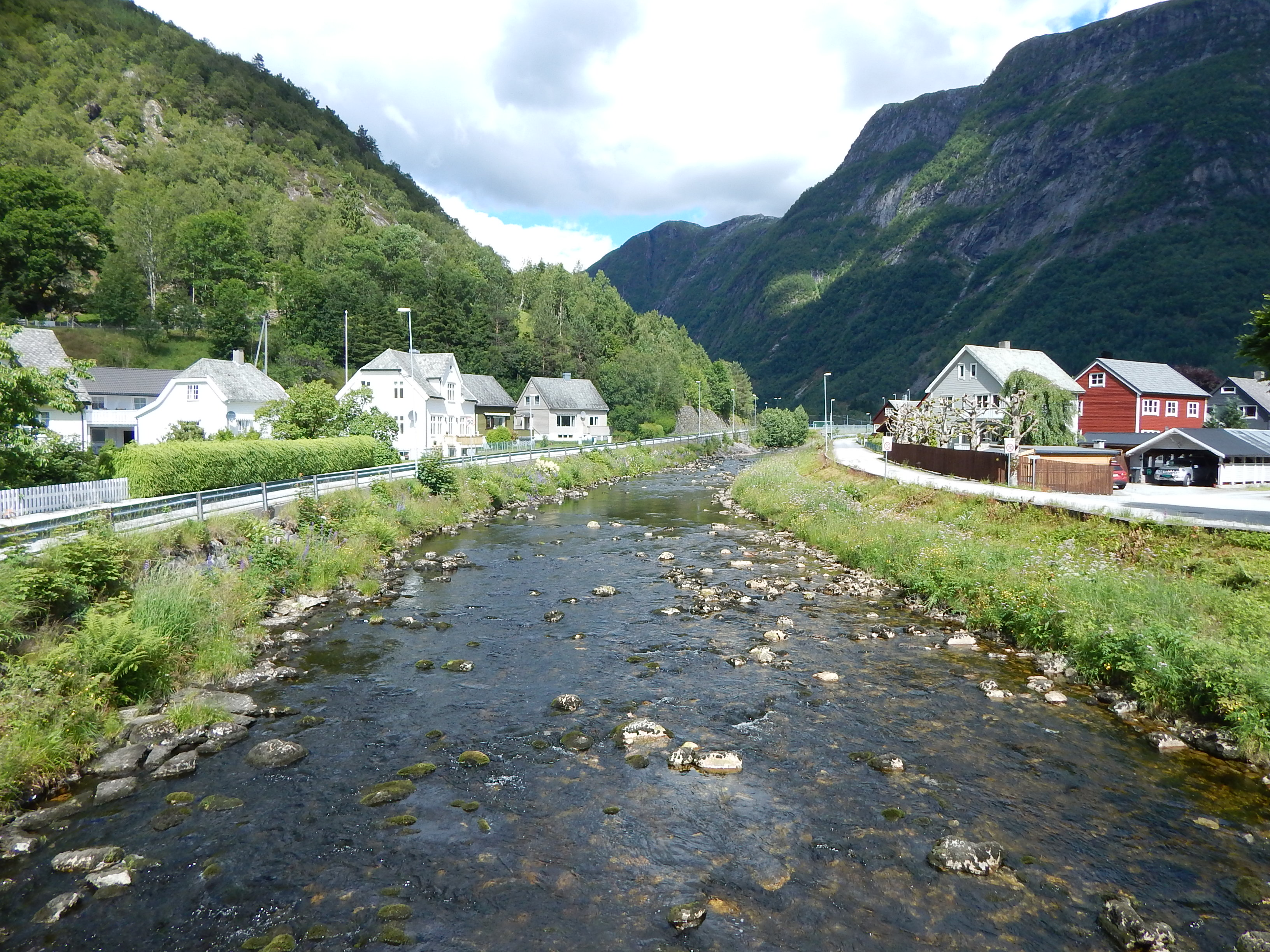 Hovlandselva i Vadheim